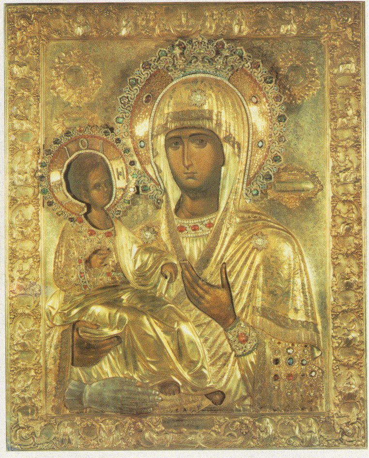 „Dreihändige” Gottesmutter (Tricheirousa), Kloster Hilandar, Athos